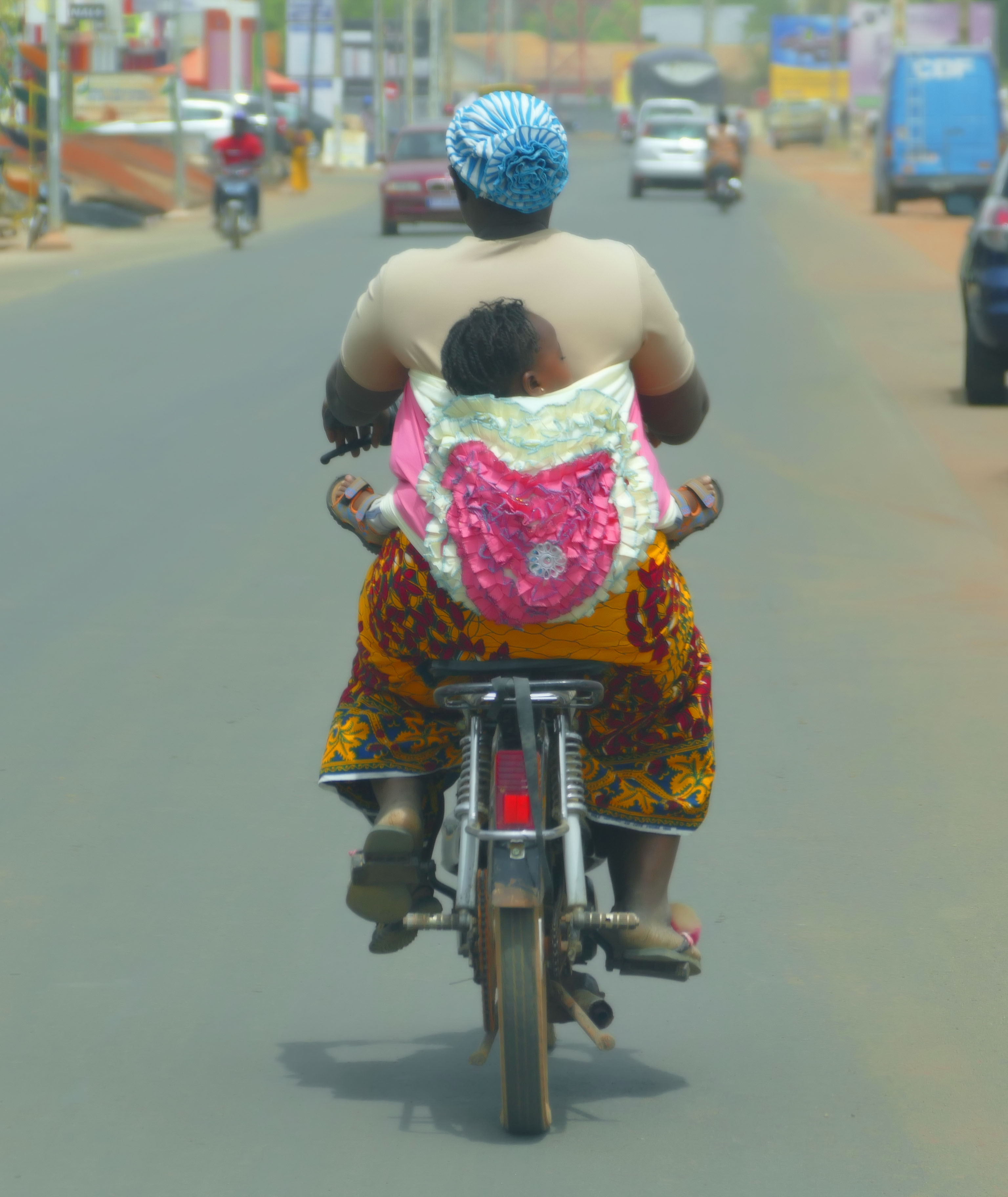 Une femme se déplaçant à moto avec son bébé au dos à Korhogo au nord de la Côte d'Ivoire. This is an image with the theme "Africa on the Move or Transport" from: Ivory Coast